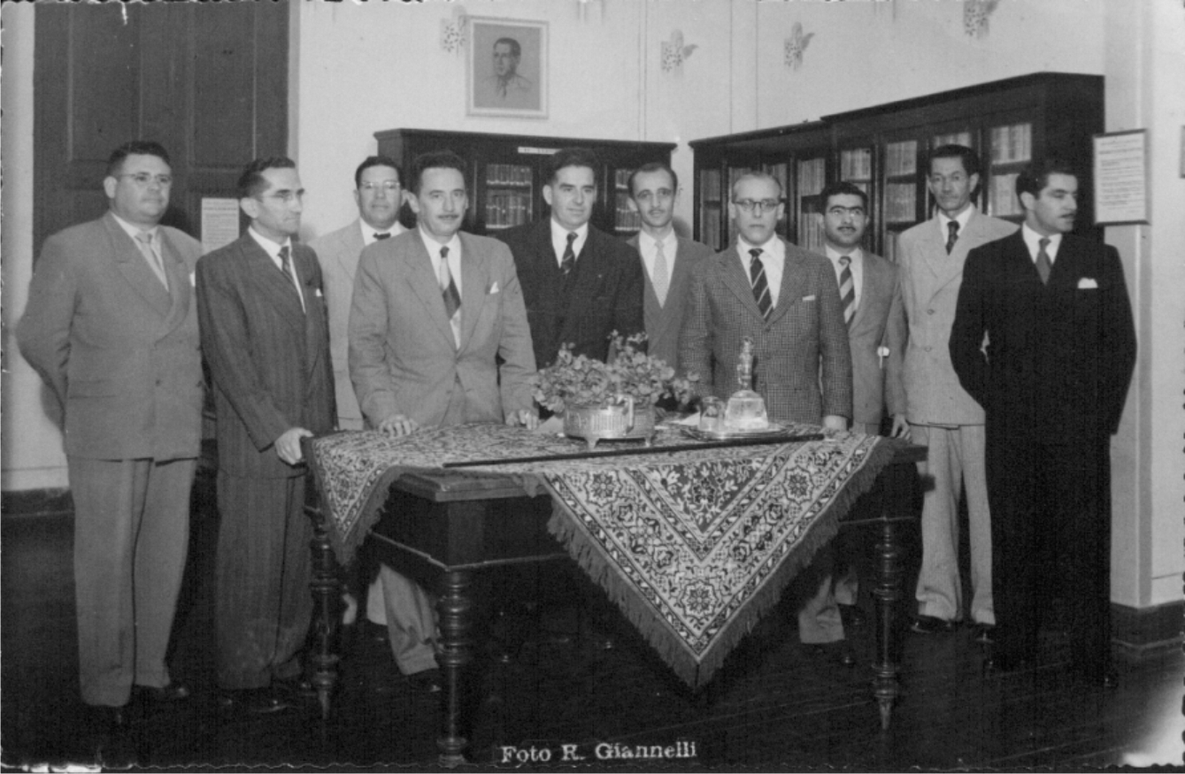 Palestra de Sérgio Milliet sobre pintura moderna, Sala da Sociedade de Cultura Artística, atual Sala de Múltiplo Uso. Teatro Municipal de São João da Boa Vista